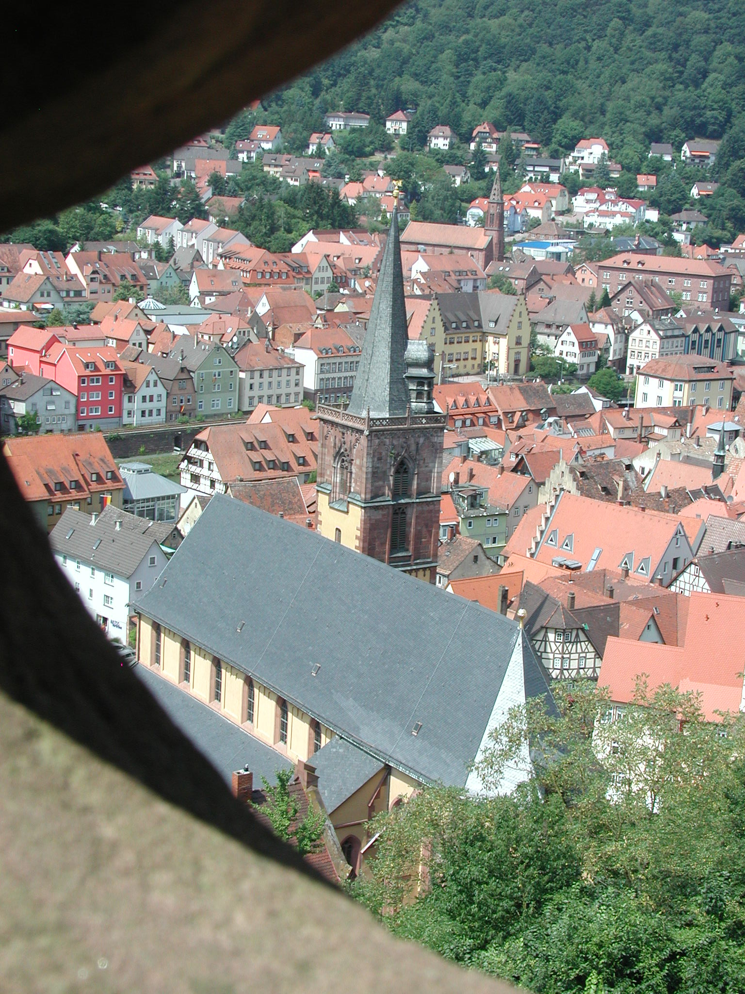 Bild: Wertheim_vdBurg.JPG